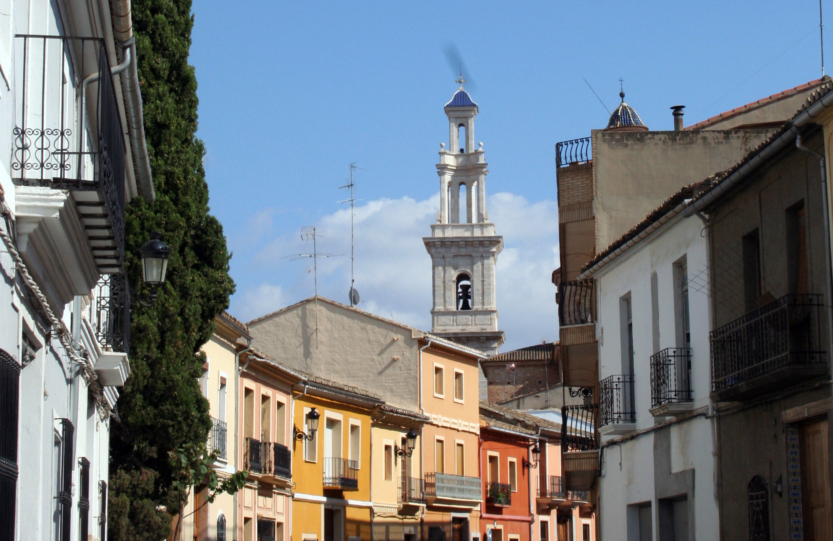 Vista del campanario de La Parroquia desde la calle "Les Parres"